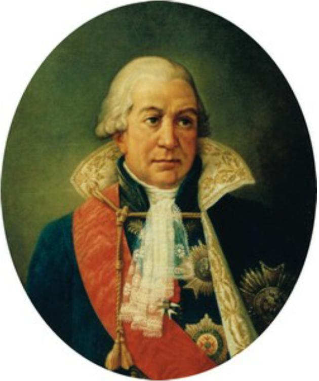 Général Louis Auguste Juvénal des Ursins d'Harville